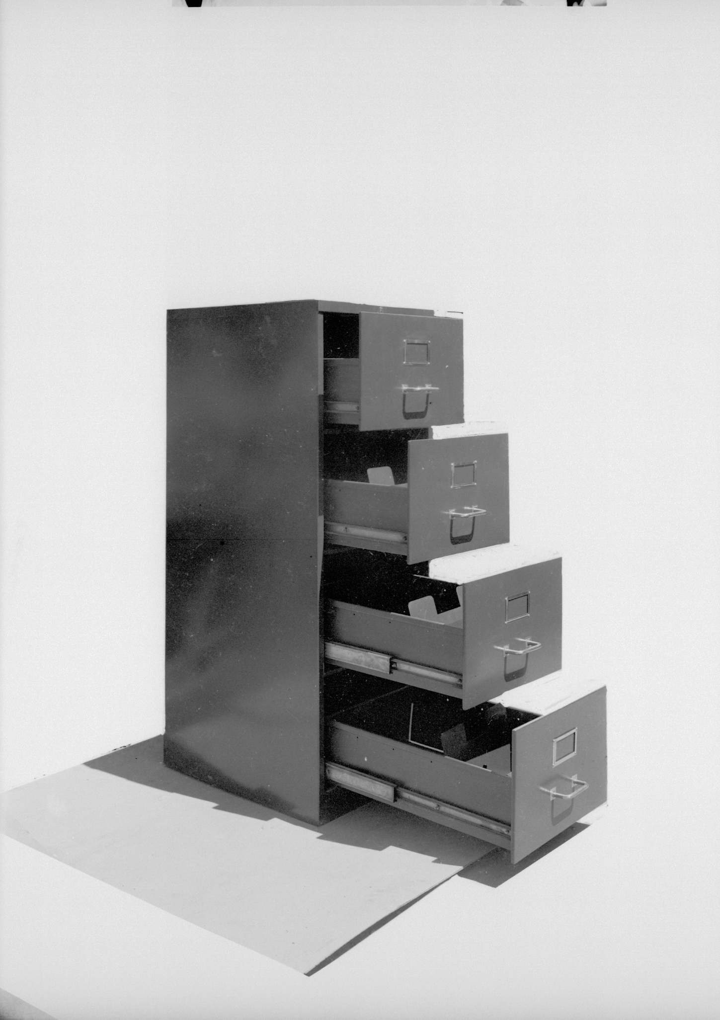 אוסף צילומים של הצלם זולטן קלוגר טווח מספרי התשלילים 15056 - 15082: הארגז בע"מ, רהיטי פלדה למשרד.